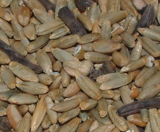 Roggenkörner mit Mutterkorn verunreinigt